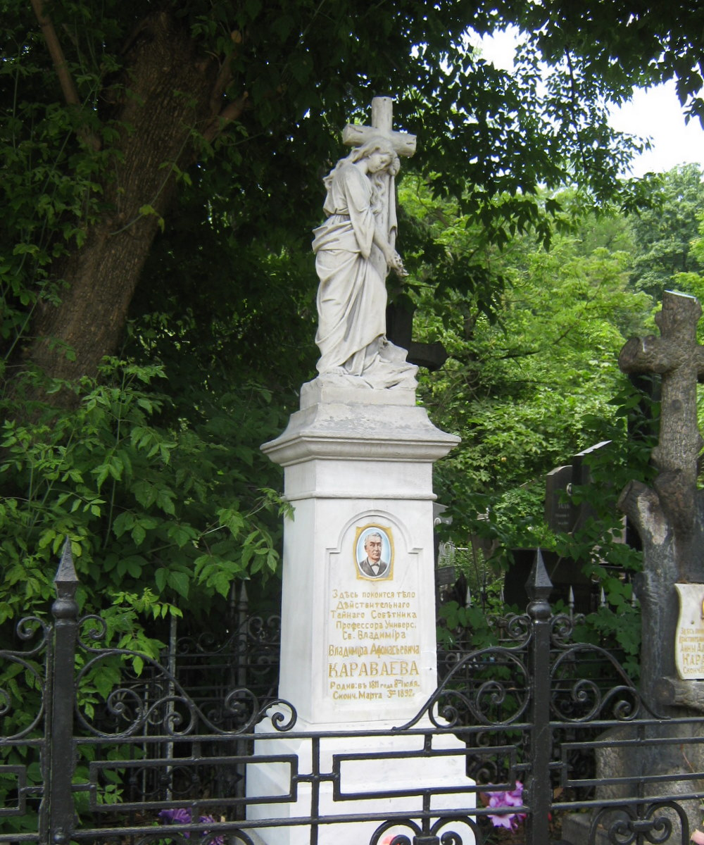 Надгробок на могилі В. О. Караваєва на Байковому кладовищі у Києві